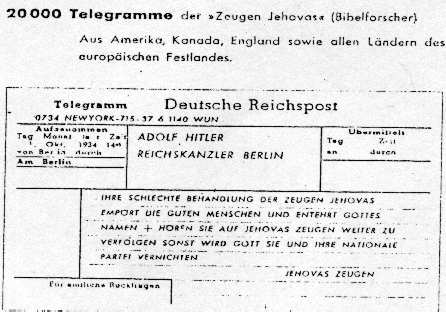 20 000 телеграмм Гитлеру от Свидетелей Иеговы